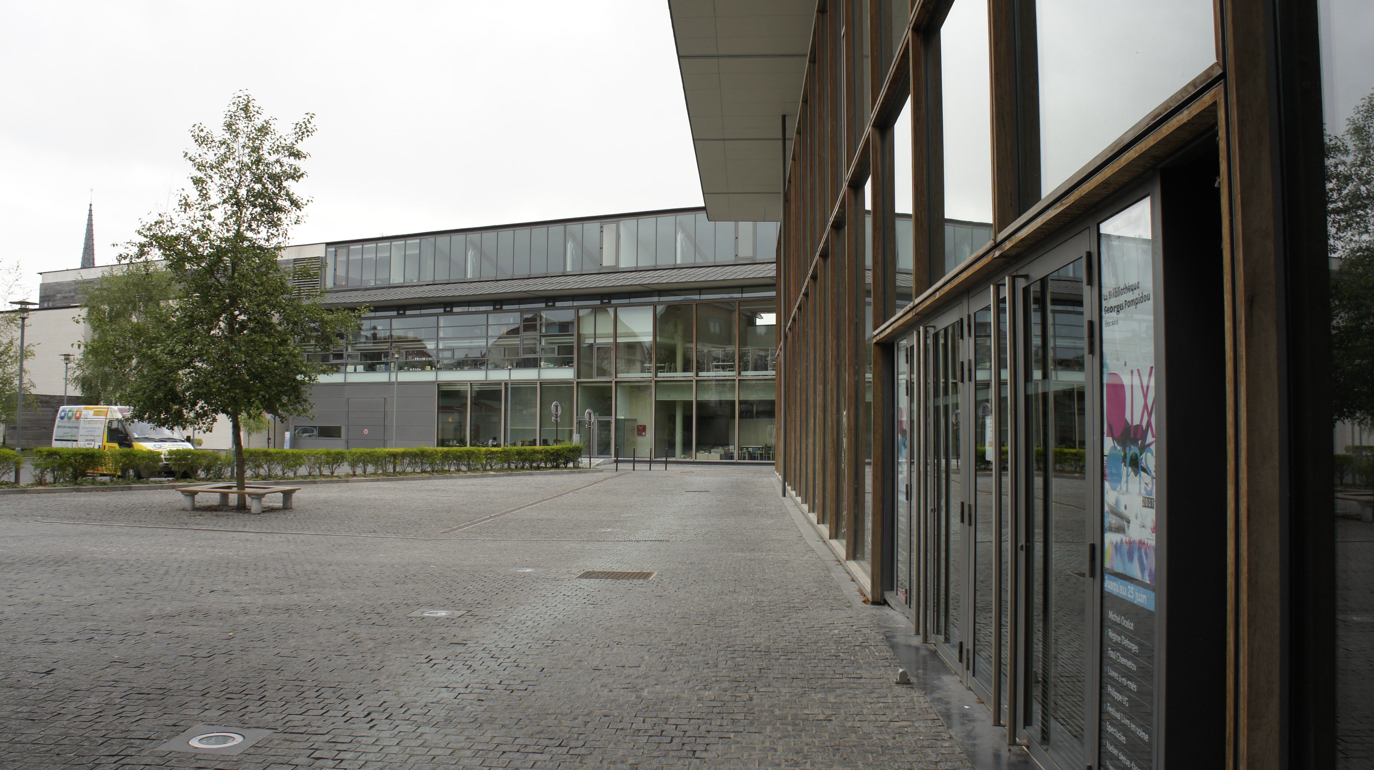 Square à Chalons avec la flèche de l'église st-Loup et la bibliothèque Pompidou.